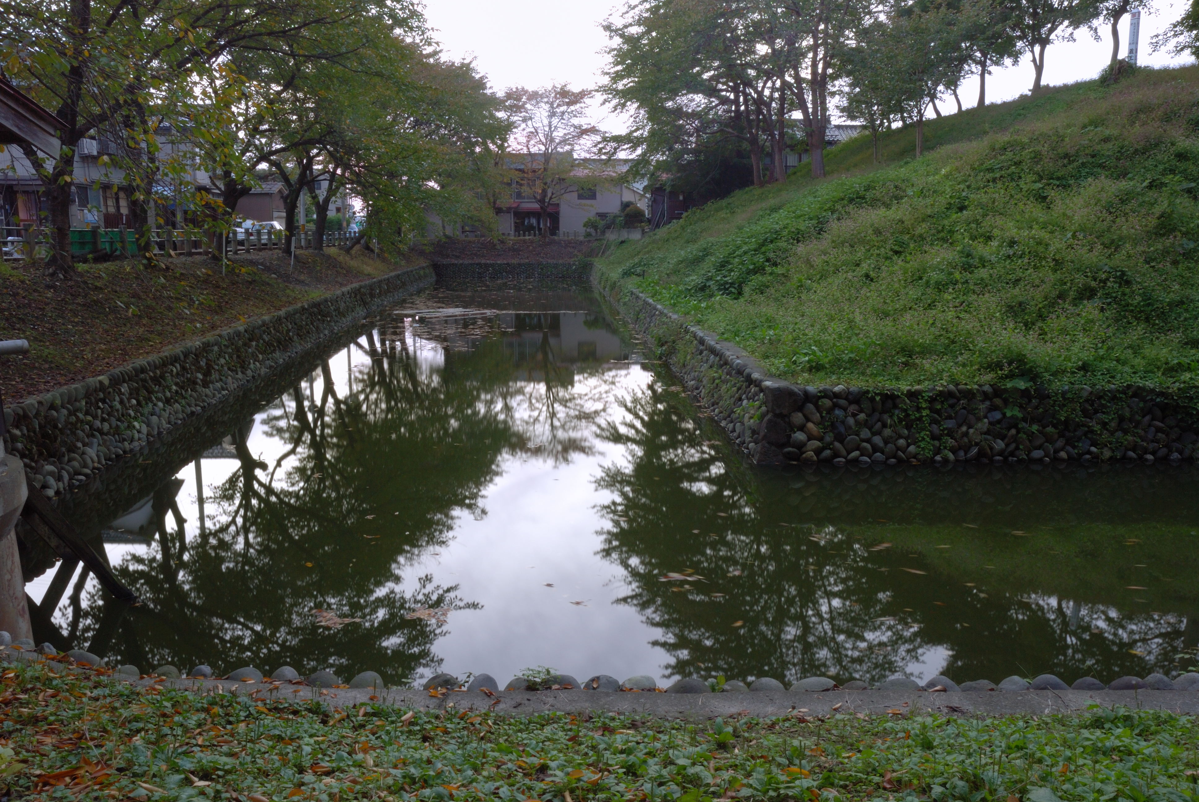 Zaodo castle hori